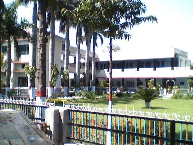 DAV COLLEGE